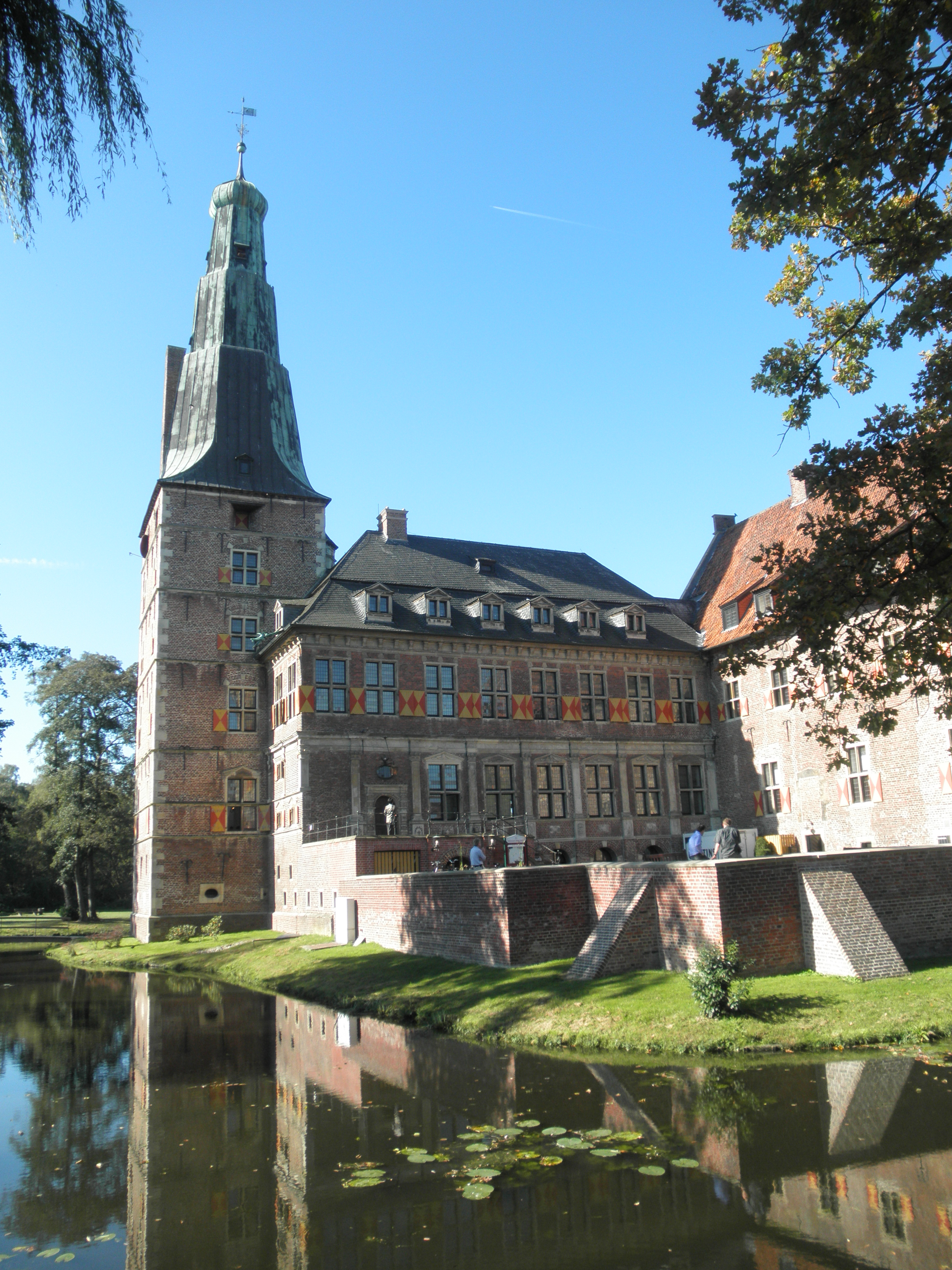 Akvokastelo Raesfeld